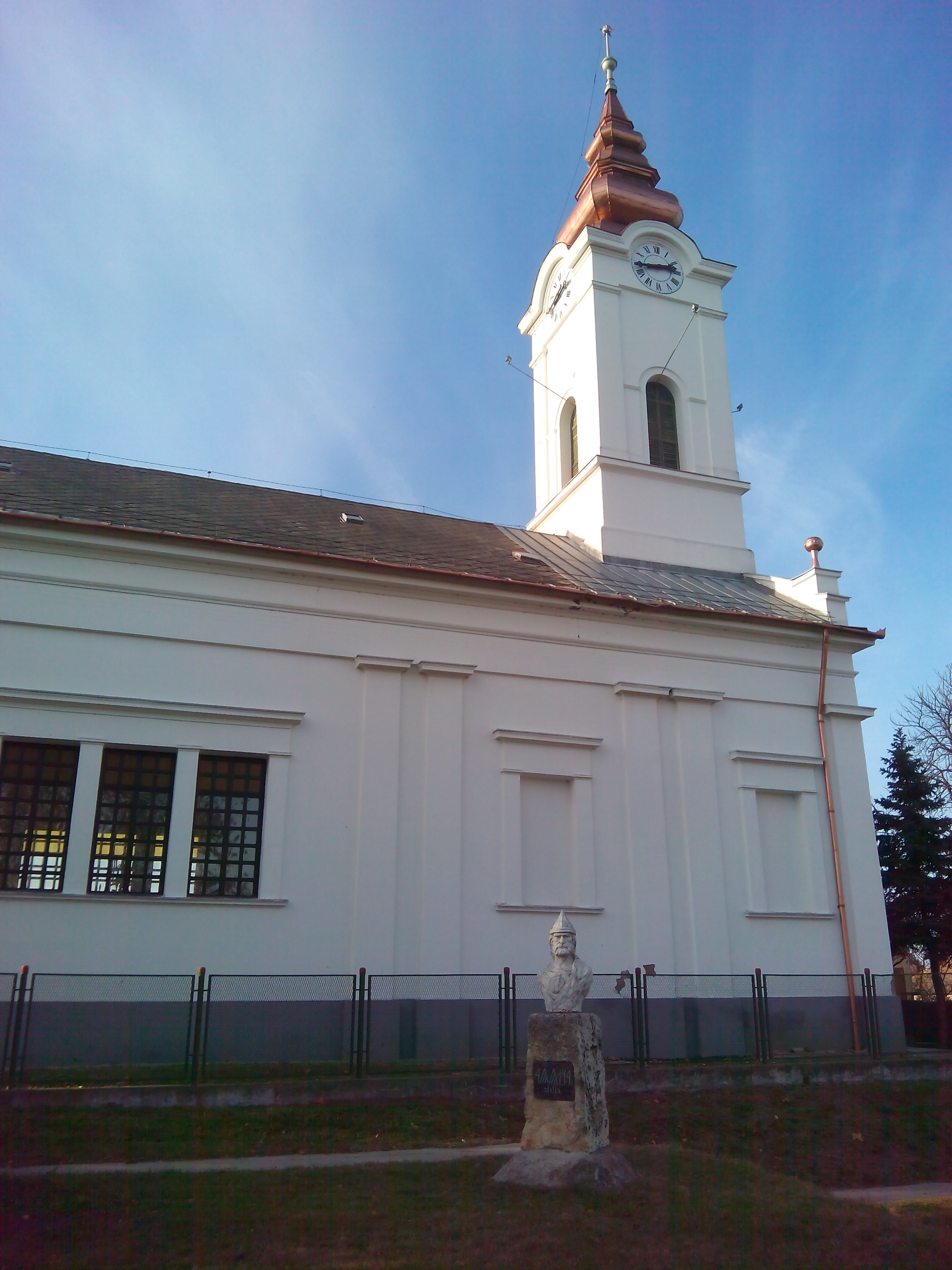 Tápiószentmárton református templom